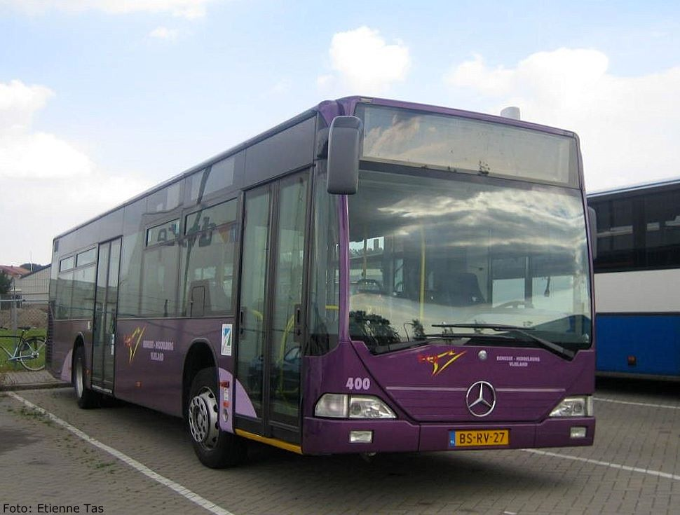 Mercedes-Benz Citaro van TCR. Dit bestand valt onder de GNU free documentation license.